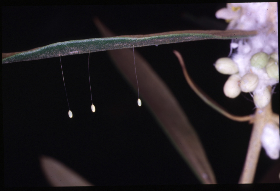 Oeuf de Chrysope (Chrysoperla carnea) sur feuille d'olivier. À gauche, en arrière plan, grappe florale colonisée par le psylle de l'olivier, Euphyllura olivina.